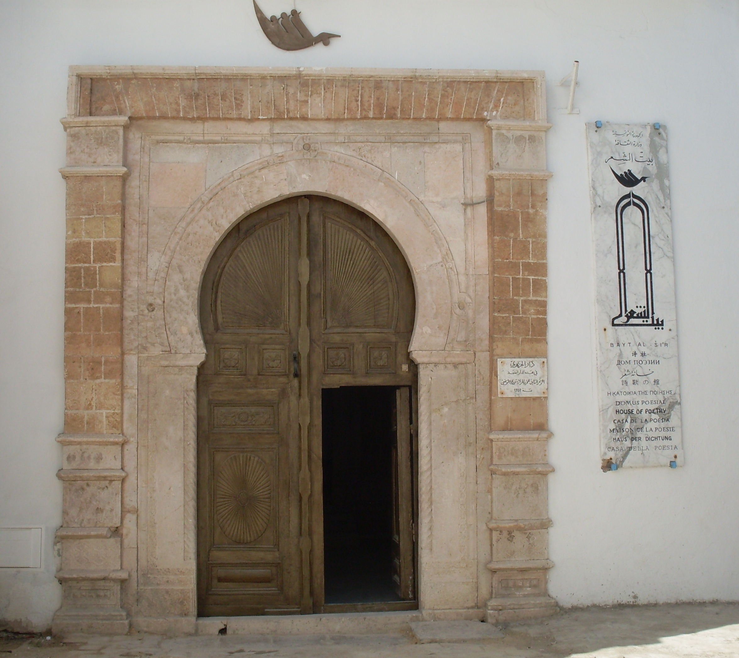 Medina de Tunis, Maison el Jaziri, maison de la poésie